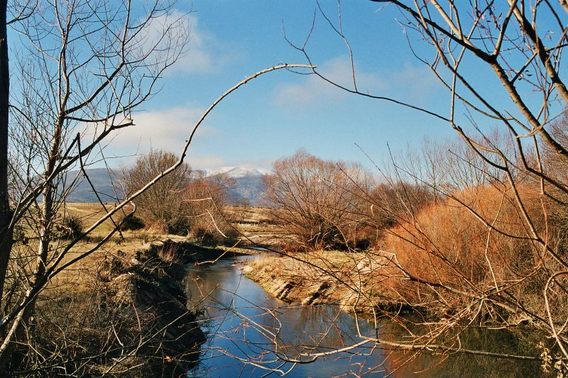 Río Adaja, Valle de Amblés, Ávila. Spain